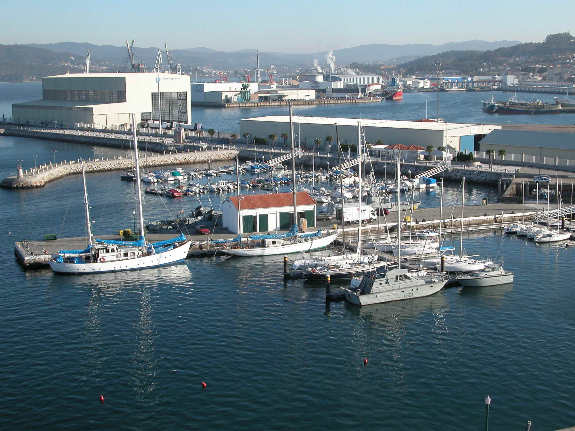 Pantaláns novos do peirao de mariñeiro de Marín: en primeiro plano, de uso militar; en segundo plano os da confraría de pescadores e ao fondo, as grandes instalacións industriais da Autoridade Portuaria. Concello de Marín.